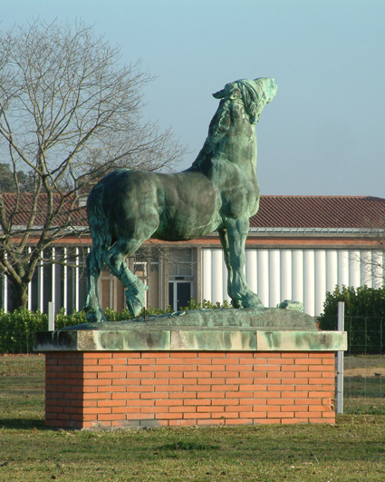 Le cheval de bronze du sculpteur Emmanuel Frémiet, à l'École nationale vétérinaire de Toulouse (France)